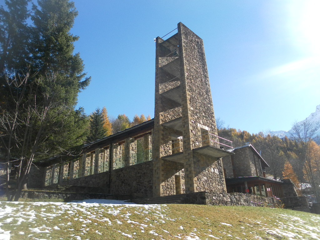 Centro ecumenico Agape, Prali (TO)